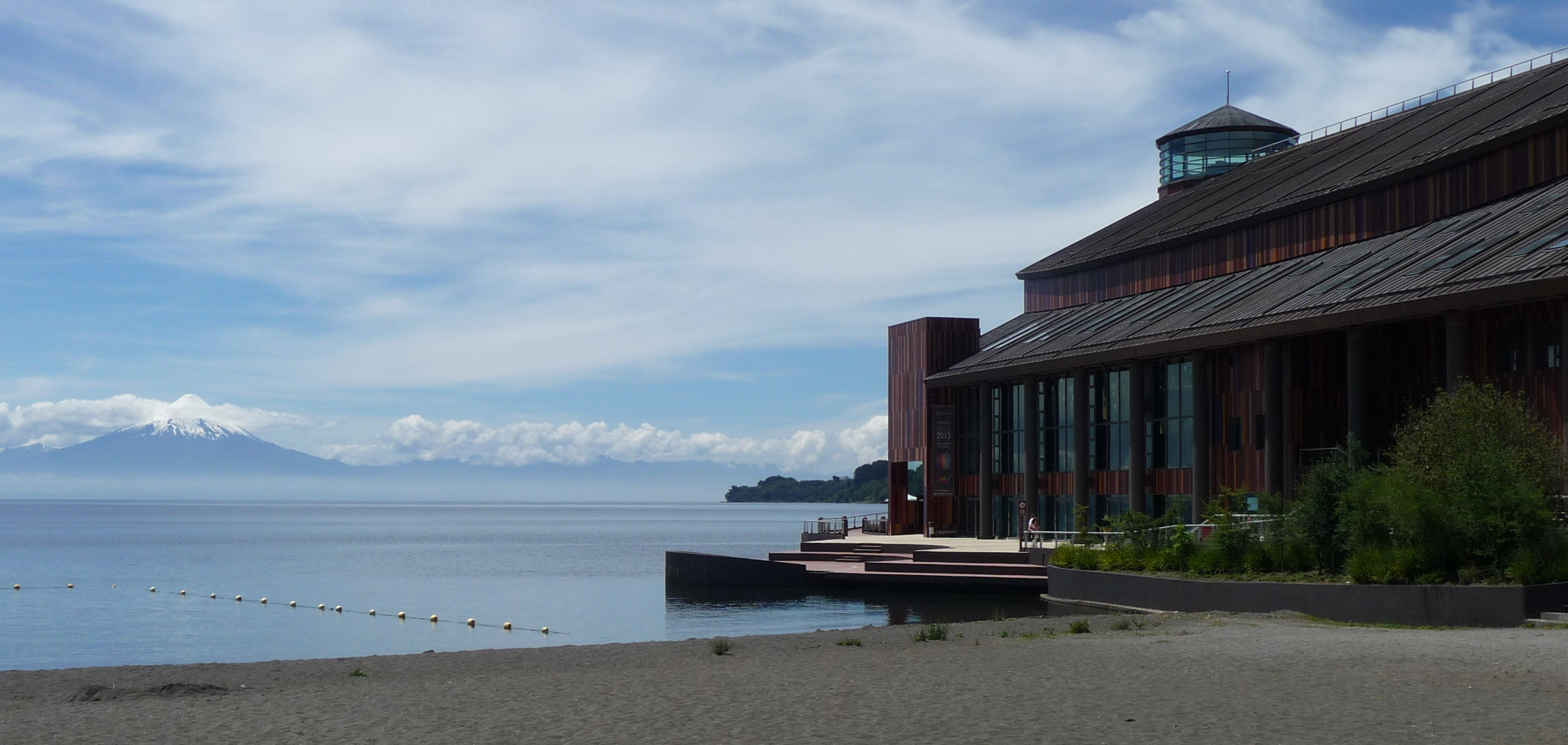 Le Teatro del Lago à Frutillar. En arrière plan le volcan Osorno